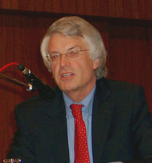 Jochen Dieckmann, visit in the CJD Christophorusschule Königswinter